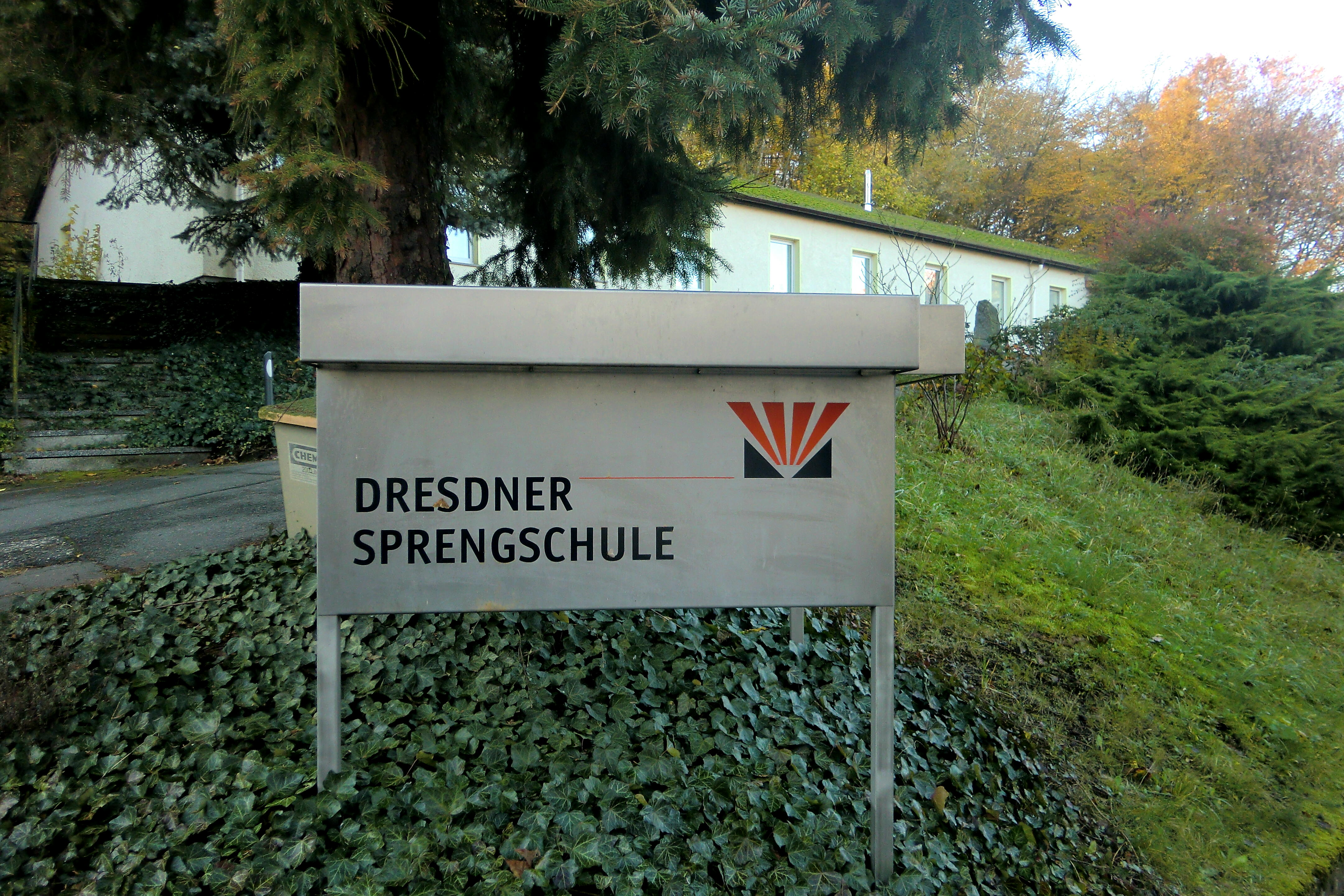 Dresden, Sprengschule. Fachschule für Sprengarbeiten, Gefahrentransporte, Pyrotechniker, Kampfmittelbeseitigung.